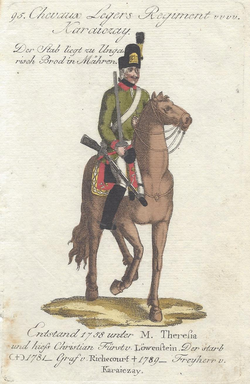 Franz Johann Joseph von Reilly: Chevaux Legers Regiment von Karaiczay, aus: Geschichtliche und bildliche Vorstellung der Regimenter des Erzhauses Oesterreich, Wien 1796